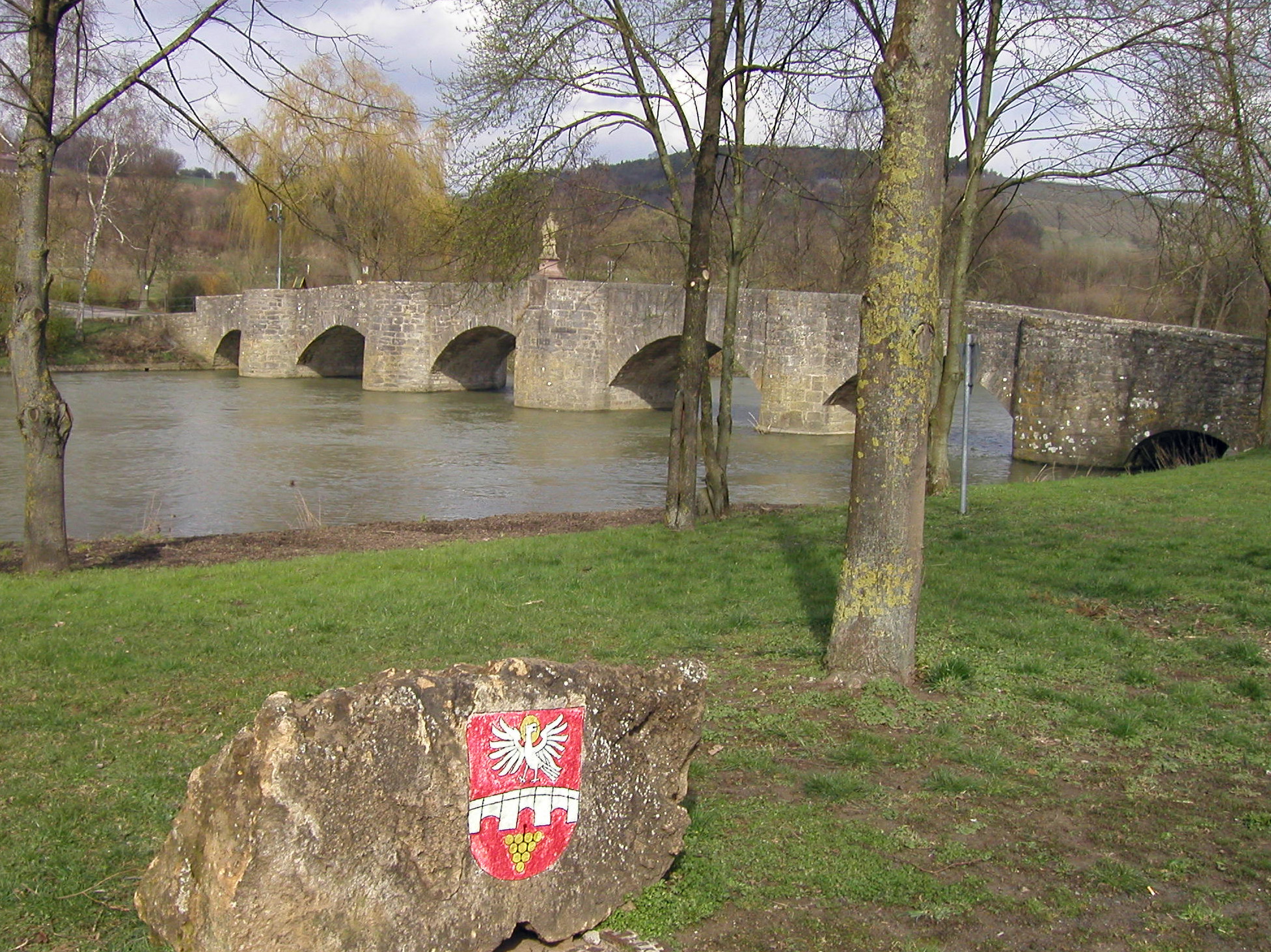 Einzige erhaltene Steinbrücke von Balthasar Neumann über die Tauber bei Tauberrettersheim